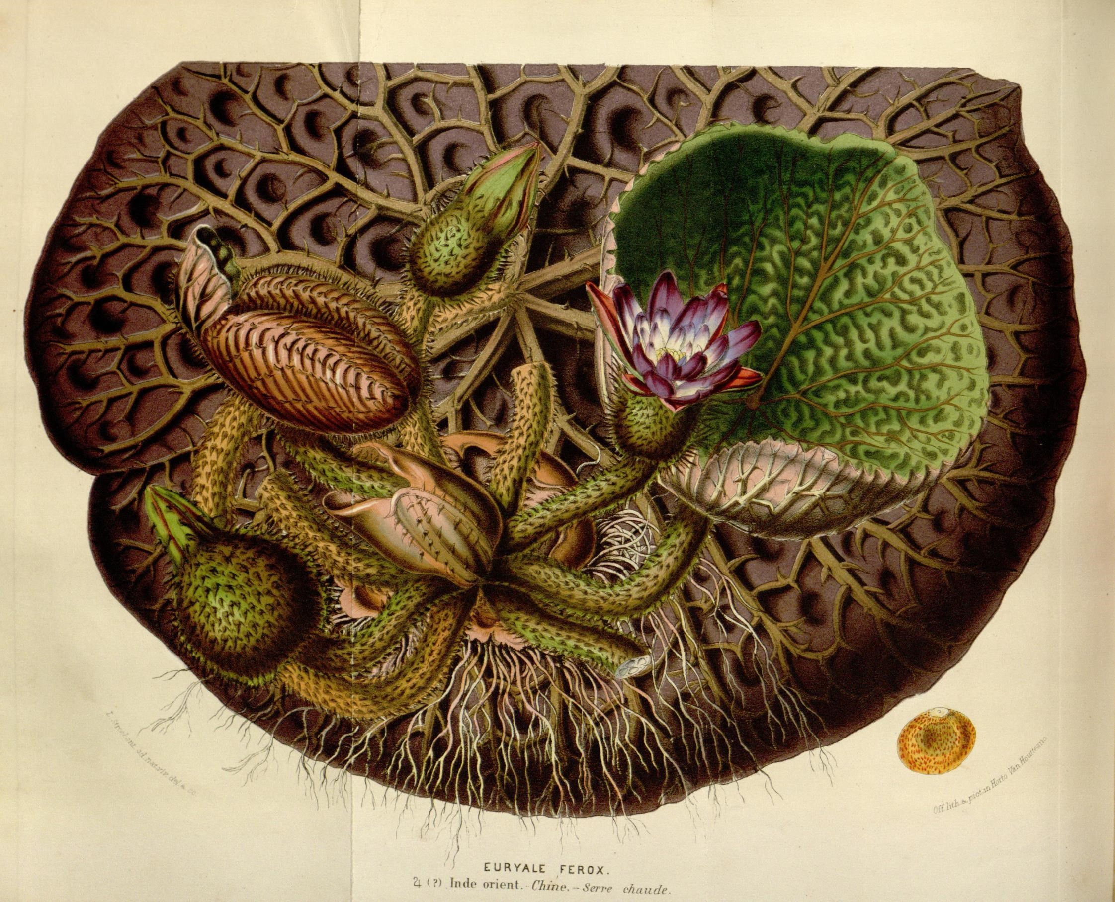 Flore des serres et des jardins de l'Europe :ou descriptions et figures des plantes les plus rares et les plus meÌ ritantes, nouvellement introduites sur le continent ou en Angleterre ...